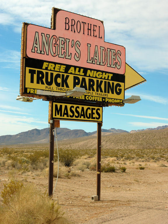 Signage Angel's Ladies, Beatty, Nevada